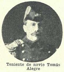 Retrato fotográfico de Tomás Alegre (1853-1911) militar argentino, esposo de Corina Caravia Gutiérrez, viuda de Guillermo Brown Blanco.